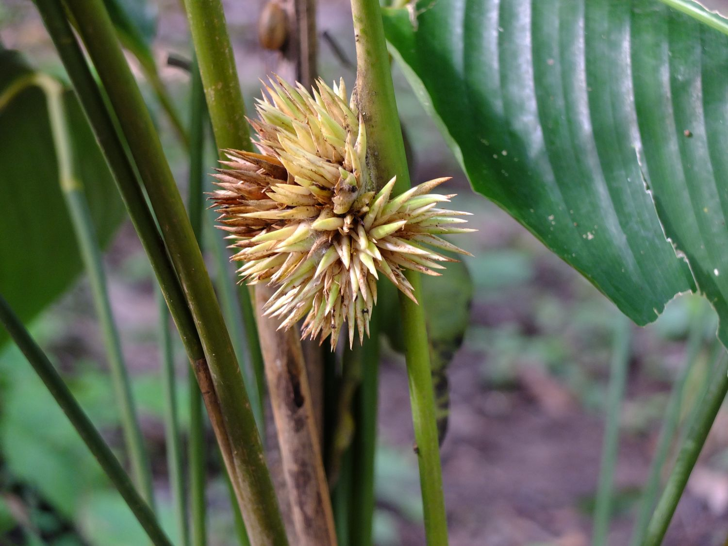 L'inflorescence apparaît sur la tige de la feuille